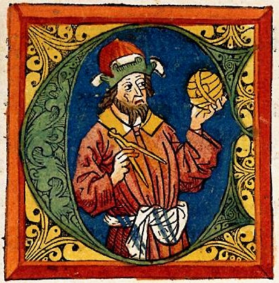 Claudio Tolomeo - In una miniatura del trattato "Geografia" edita a Ulm (Germania) nel 1482